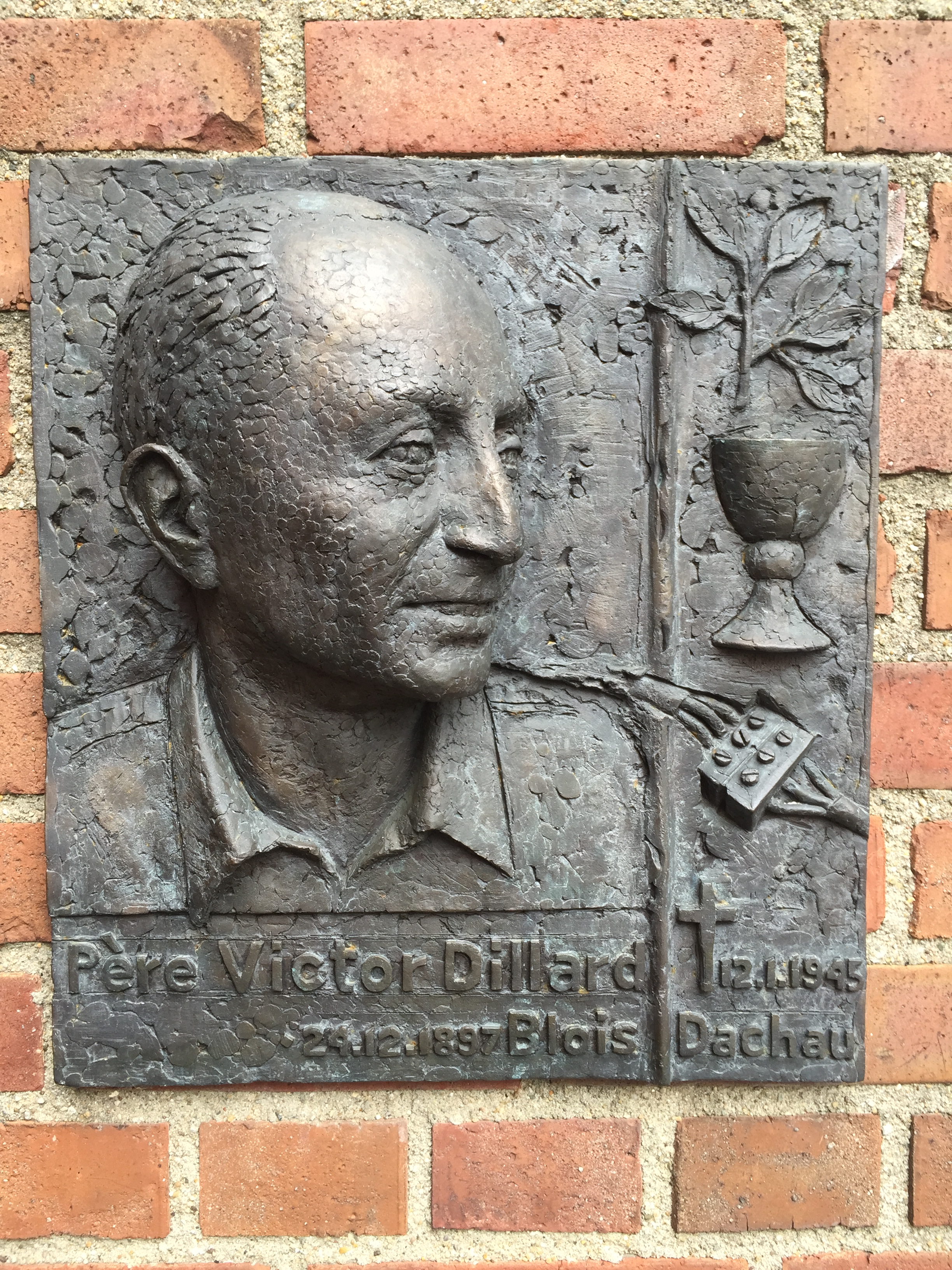 Hatzfelder Straße, Wuppertal